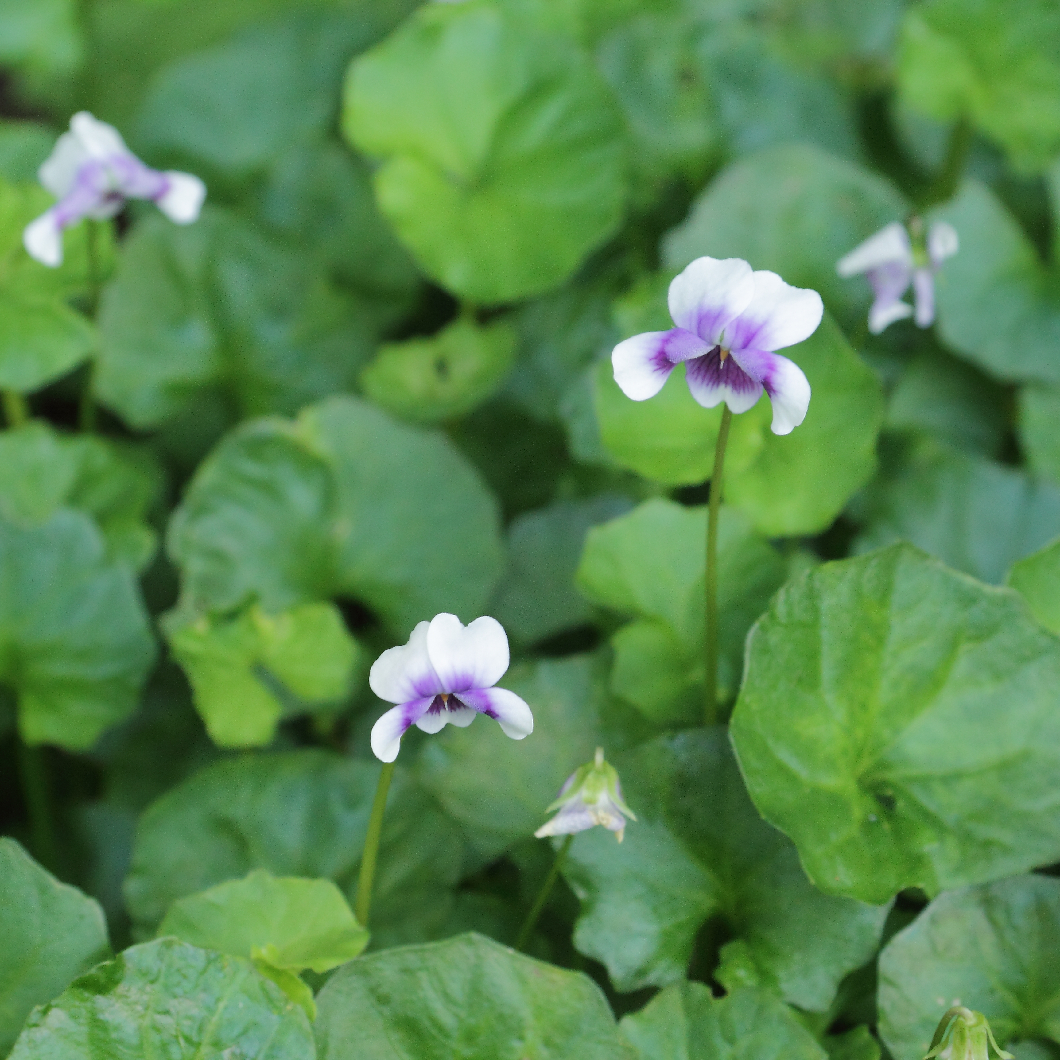 Viola hederacea, identifierad med hjälp av befintlig skylt vid Kew Gardens, London. Note: This species was reclassified in 2004. This is viola banksii not hederacea.